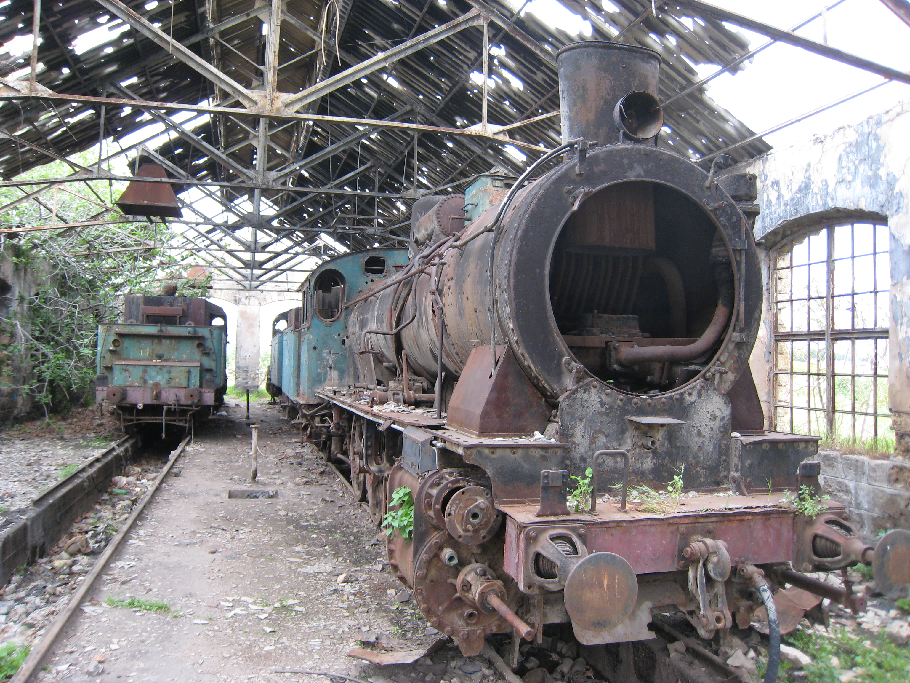 Locomotive à l'abandon en gare de Tripoli (Liban)